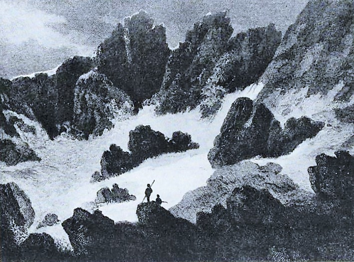 Snøhetta i Dovre, Norge. Tegning/radering av Sir Thomas Dyke Acland (1787-1871); utgitt i Alex Lamottes bok Voyage dans le Nord de l'Europe, consistant principalement de promenades en Norwege … dans l'anneé MDCCCVII (1813), og ofte tilskrevet Lamotte.